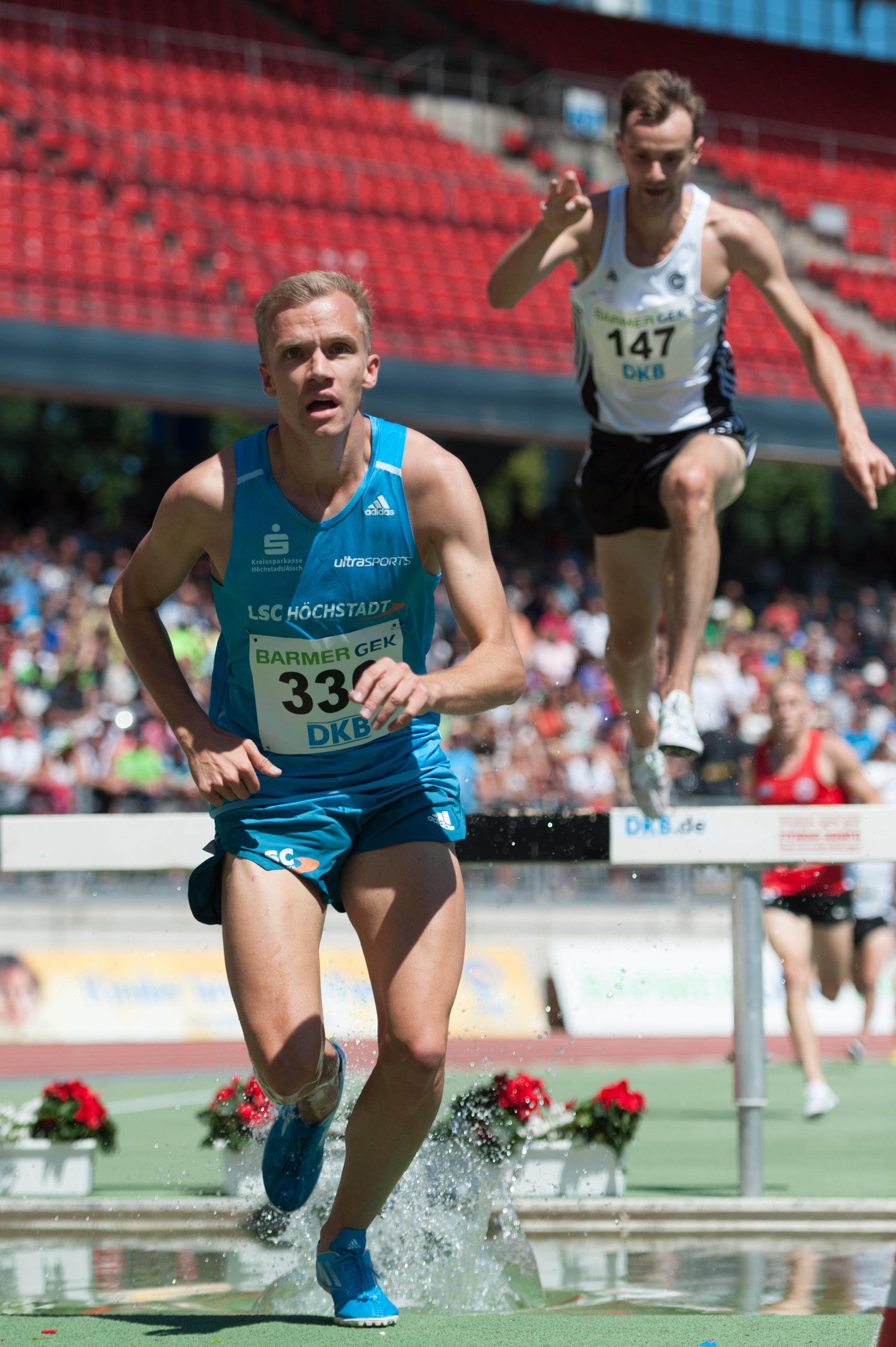 Deutsche Leichtathletik-Meisterschaften 2015: Männer 3000m Hindernis - Martin Grau, LSC Höchstadt/Aisch